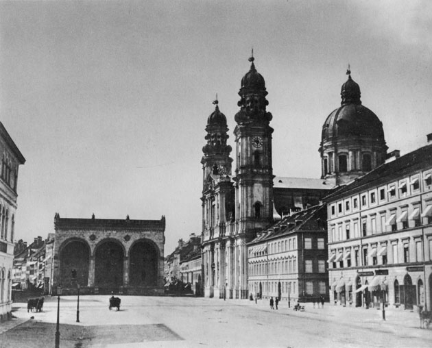 München, Odeonsplatz mit Feldherrenhalle und Theatinerkirche